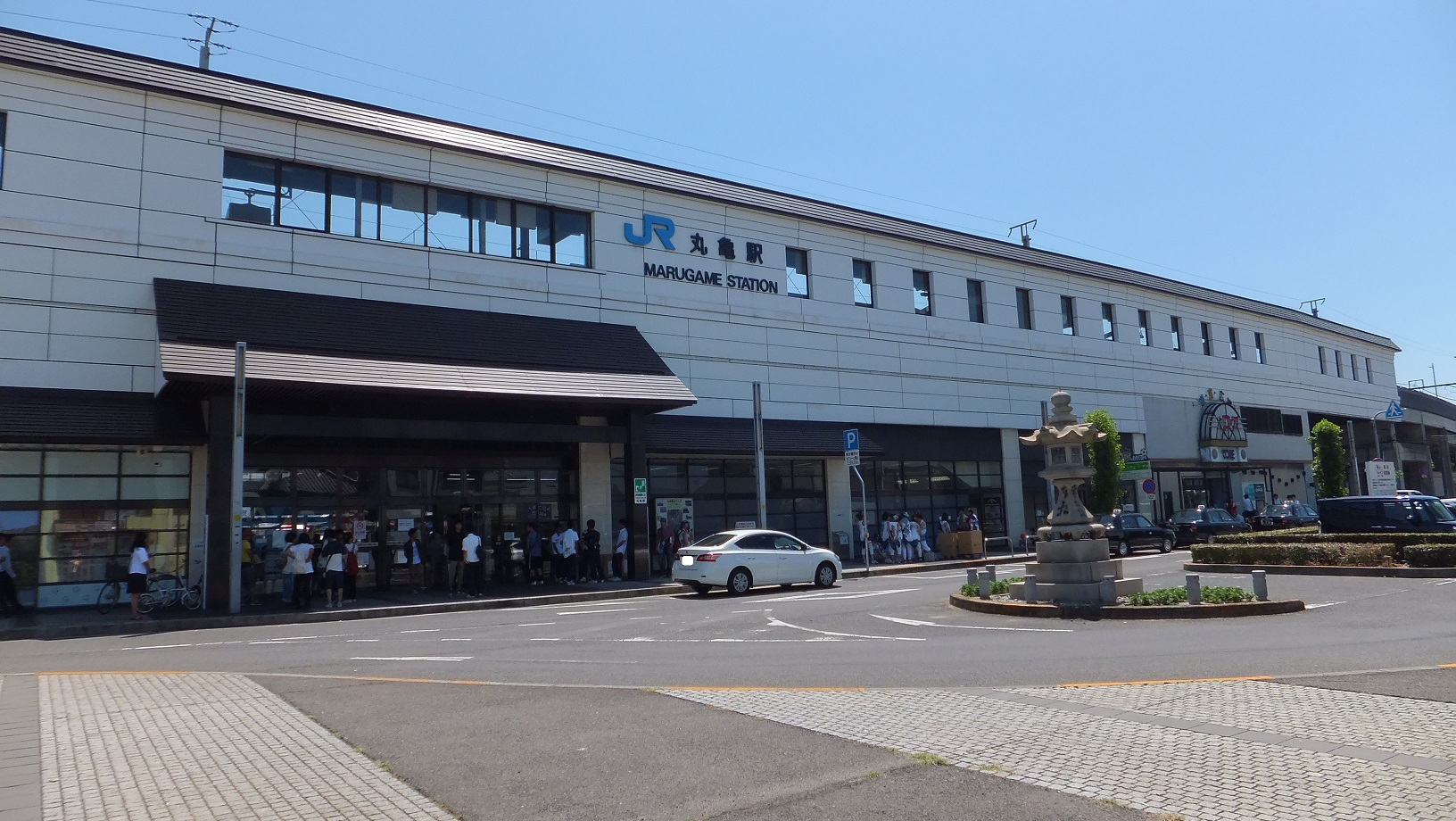 香川県丸亀市 丸亀駅（北口） 2015年8月 まるがめ婆娑羅まつり開催中